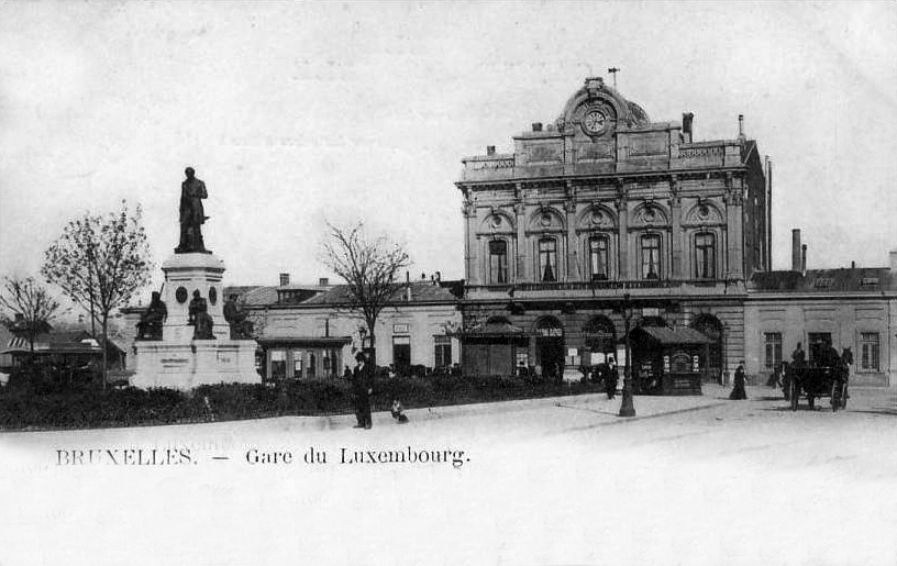 La gare Luxemourg à Bruxelles vers 1900.